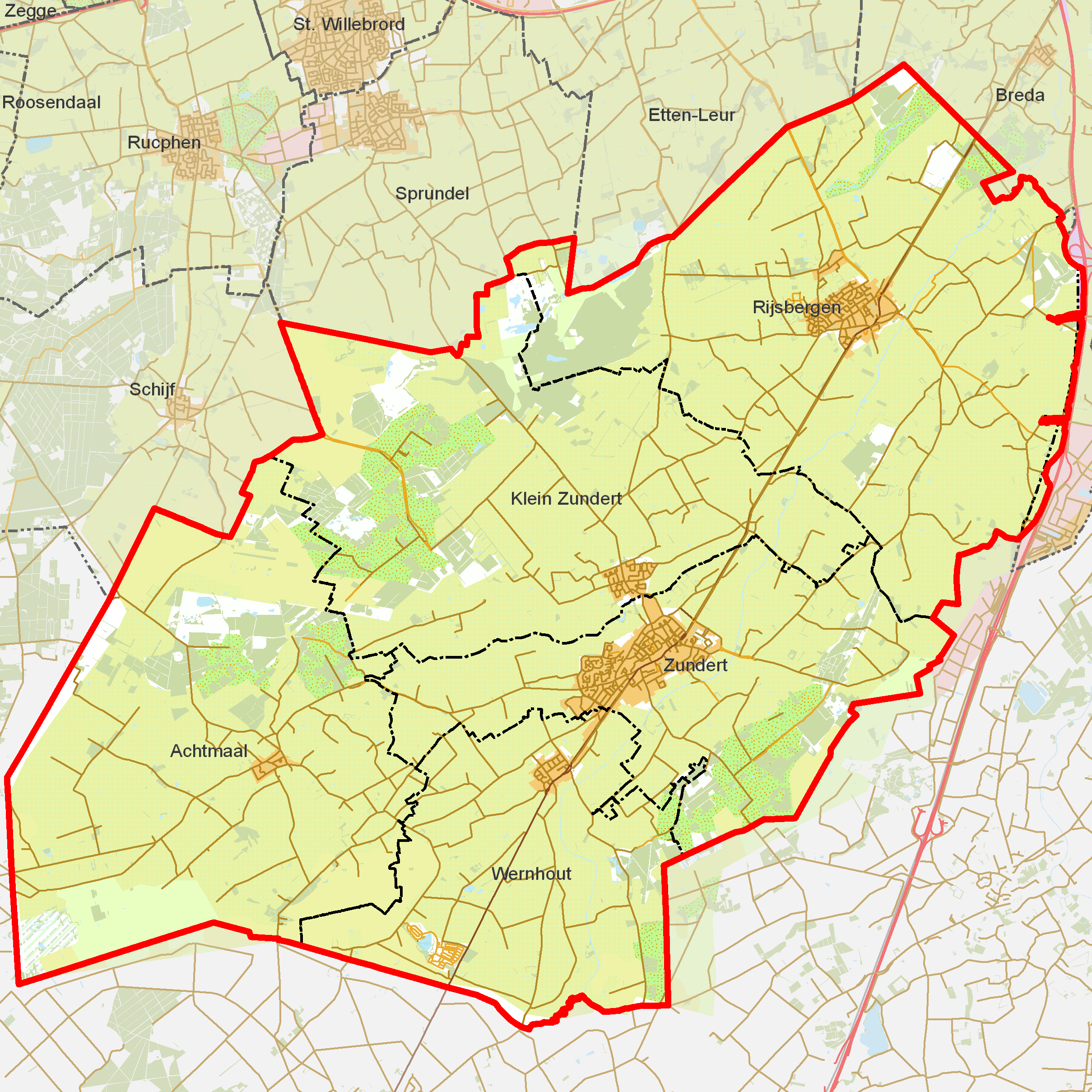 BAG woonplaatsen - Gemeente Zundert.png